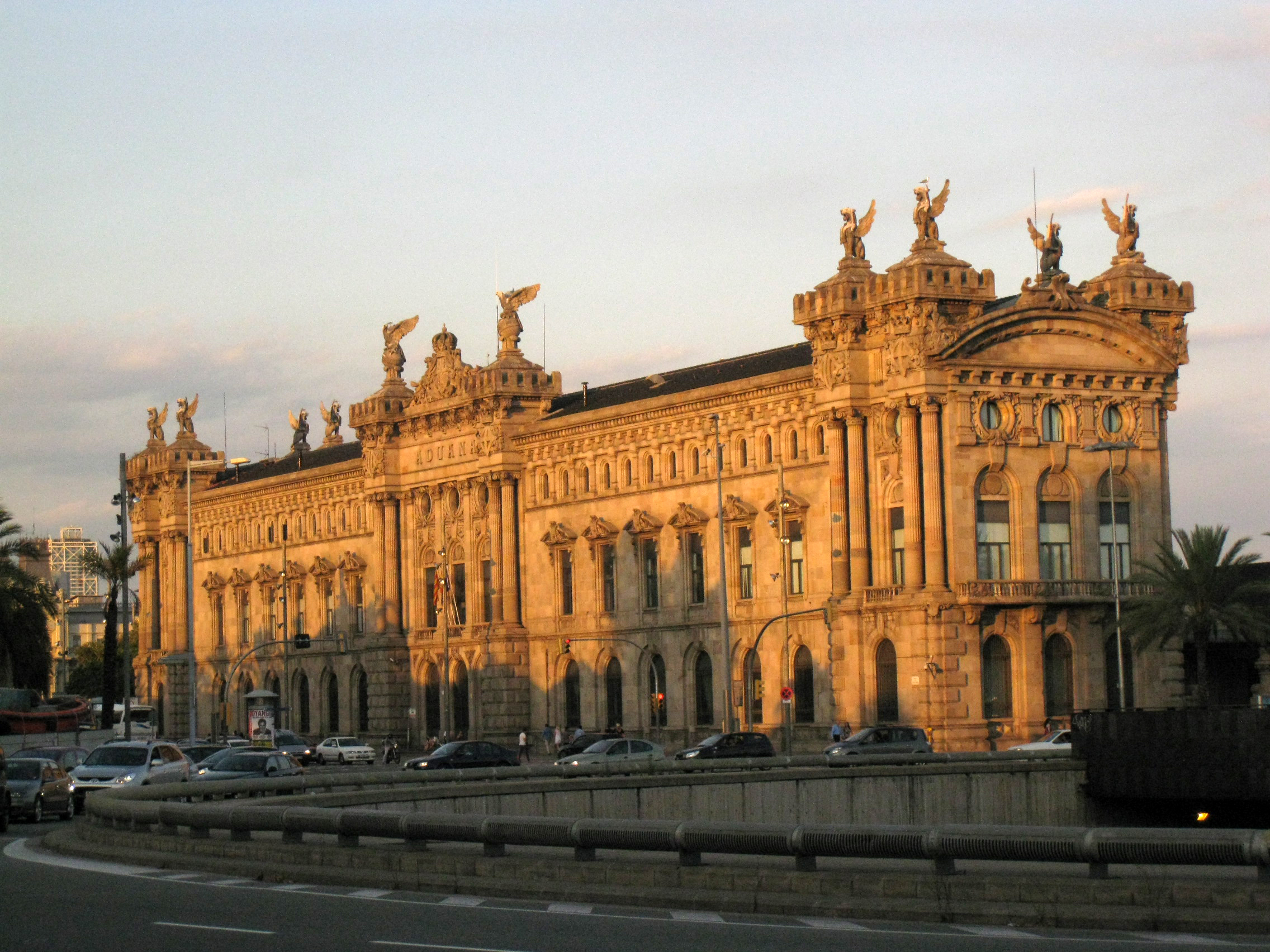 Edifici de la Duana, d'Enric Sagnier (1896-1902), al Port de Barcelona, vist des de la plaça de la Carbonera, al final del Paral·lel